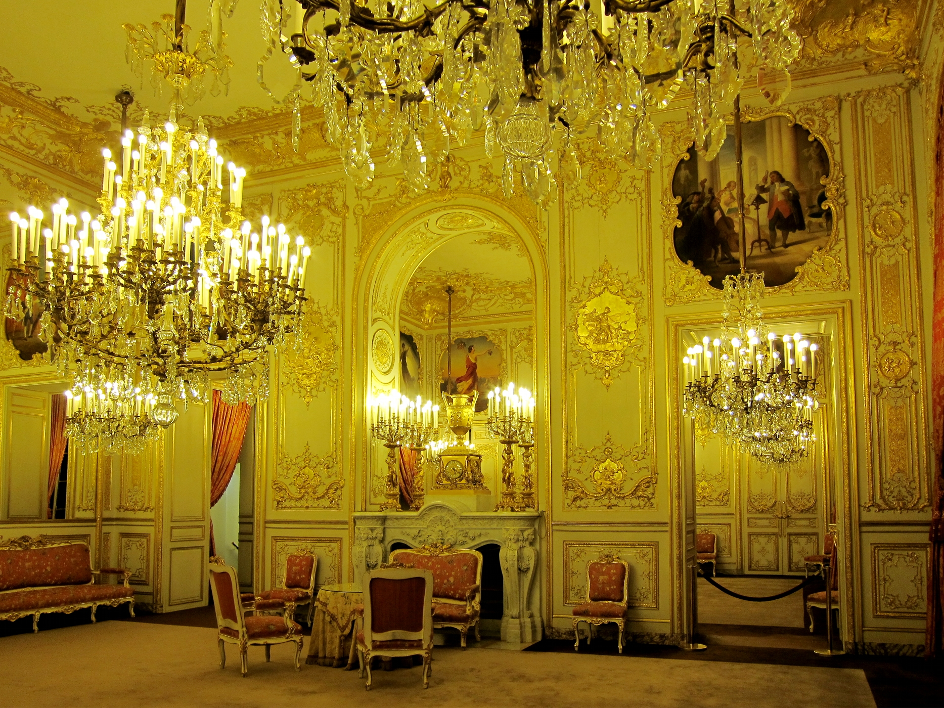 Petit salon dans l'hôtel de Lassay à Paris (France).